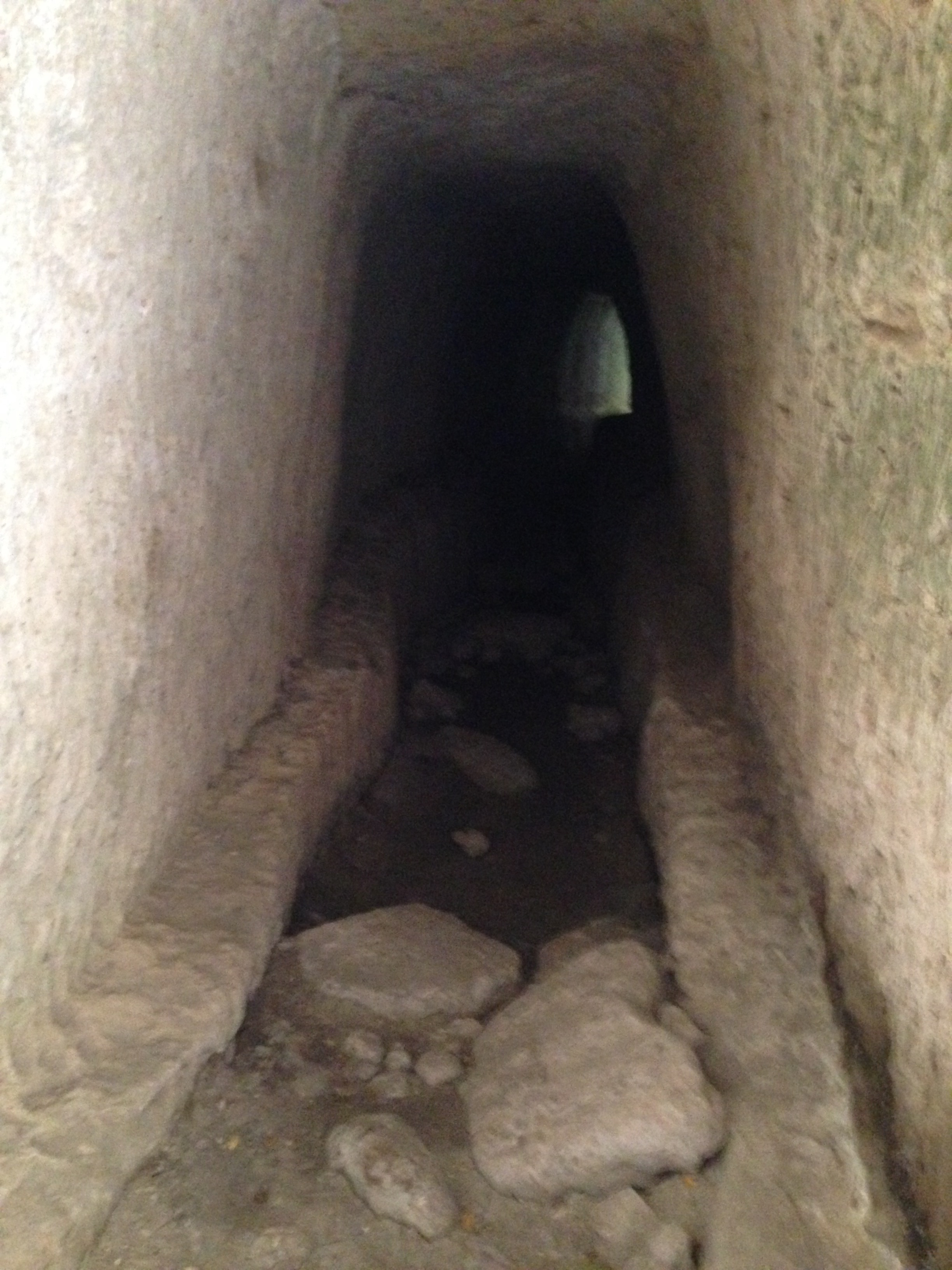 acquedotto greco (Noto antica)